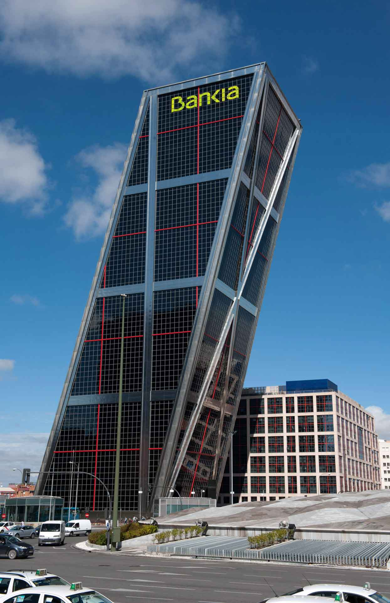 Sede corporativa de Bankia.